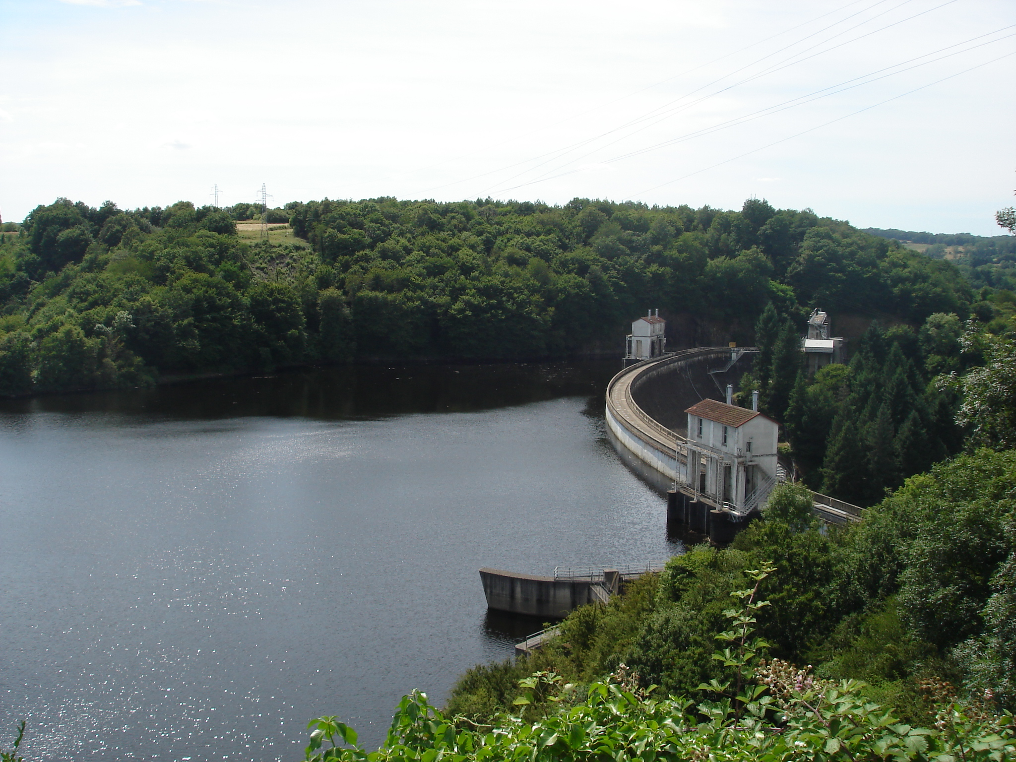 Barrage d'Éguzon (36) : La crête du barrage depuis la rive droite.